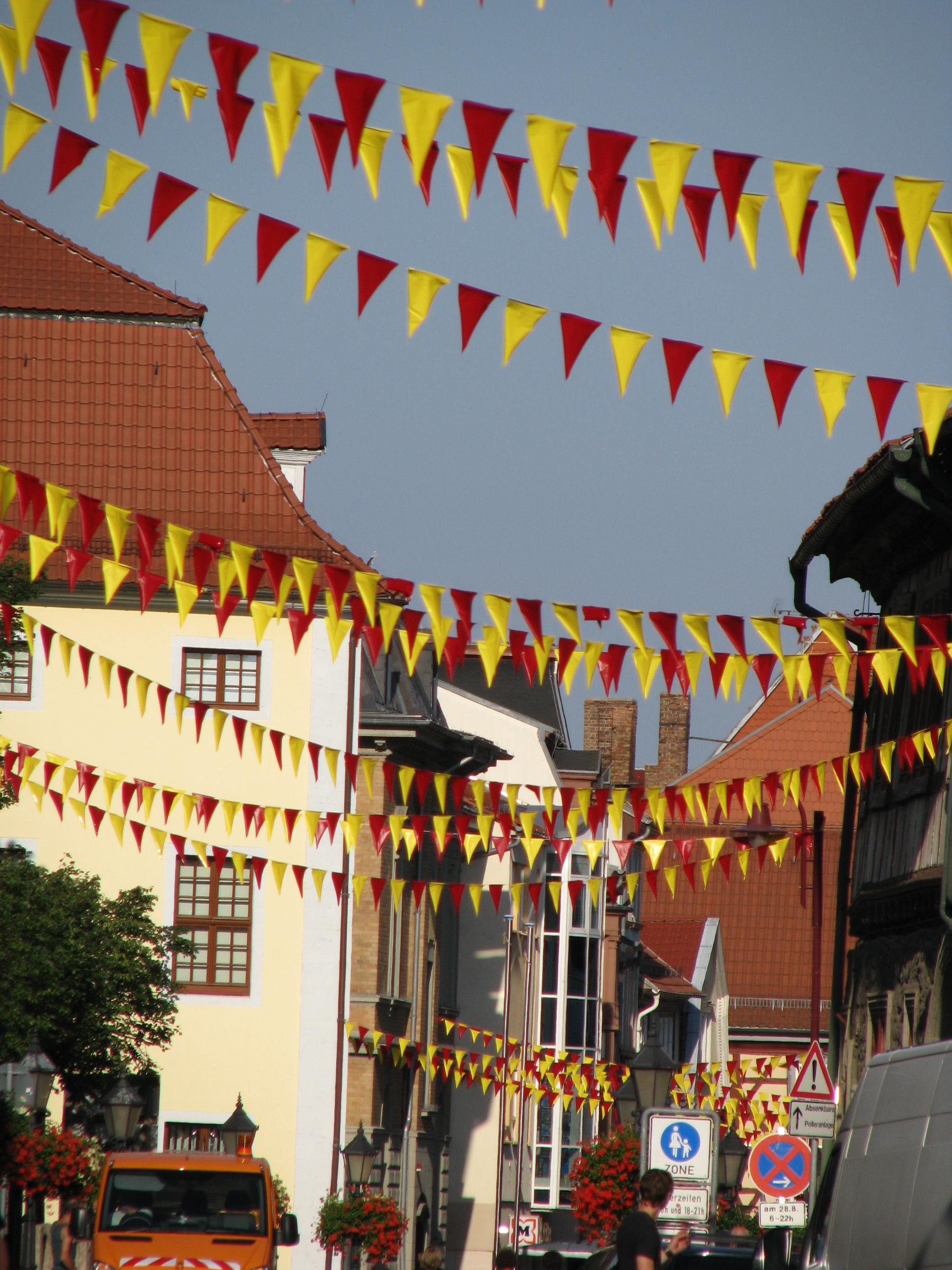 Kirmeswimpel, hier am Steinweg, prägen die Mühlhäuser Kirmes.